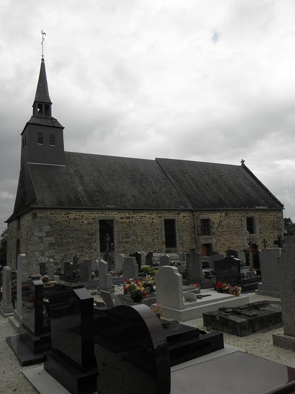 Vue méridionale de l'église Saint-Martin à Martigny, département de la Manche, France.